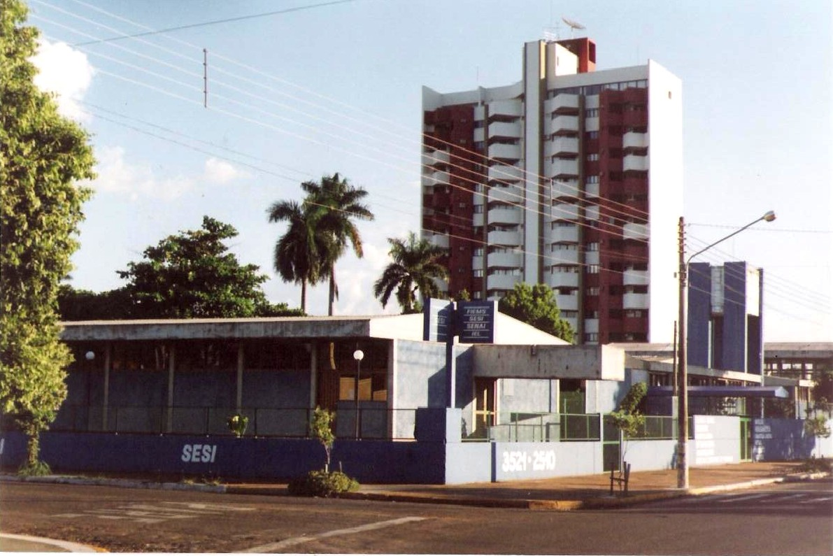 Descrição: Escola Sesi em Três Lagoas, Mato Grosso do Sul, Brasil. 2007.